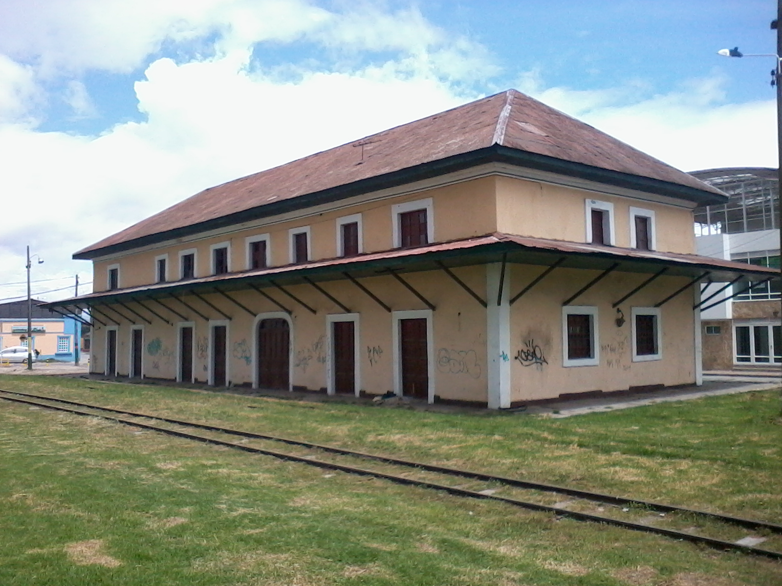 Monumento nacional de Colombia 14-073 Estación del ferrocarril de Mosquera (Cundinamarca)